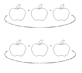 田中博史教諭・なぞりましょう。